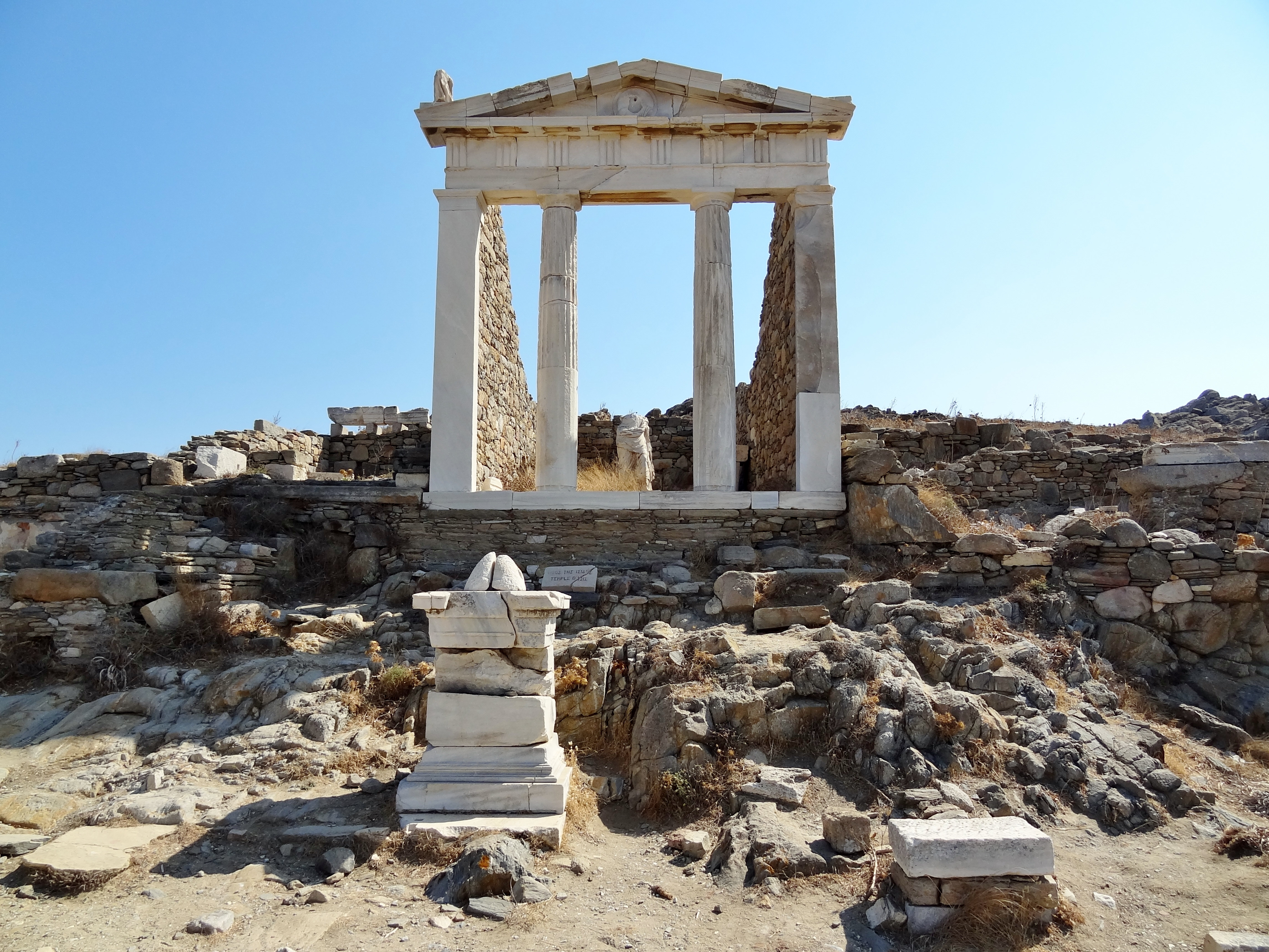 Isistempel auf der Insel Delos, Kykladen, Griechenland